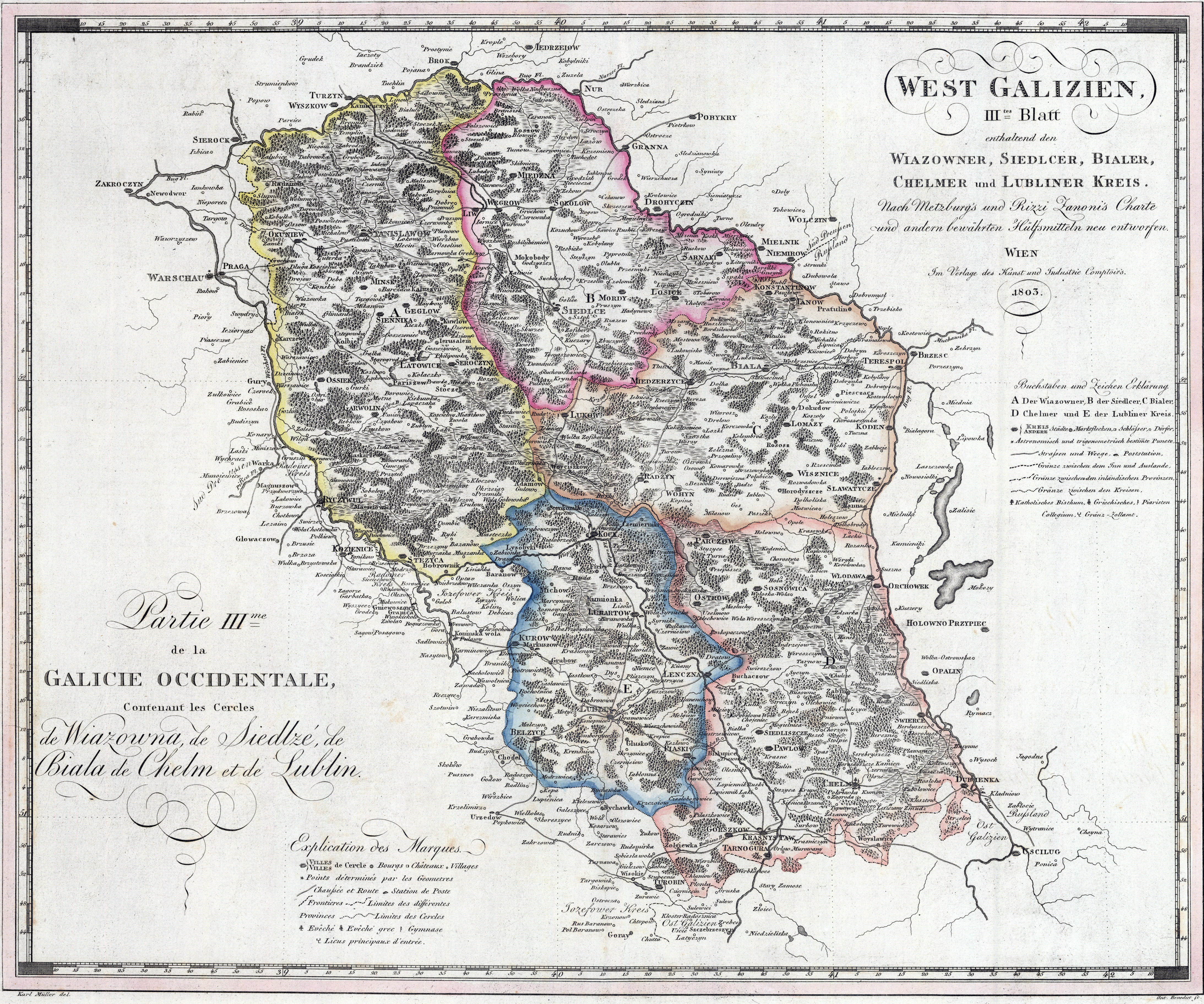 Mapa Nowej Galicji (Galicji Zachodniej) - karta nr 3 - cyrkuły: wiązowieński, siedlecki, bialski, chełmski i lubelski Mapa ukazuje podział administracyjny według stanu na początek 1803 - po likwidacji cyrkułu łukowskiego (początek 1802) a przed reformą z maja 1803 r., gdy połączono cyrkuły bialski i chełmski, siedlecki i wiązowieński oraz lubelski i józefowski. Opis oryginalny: West-Galizien : nach Mezburg's und Rizzi Zanoni's Charte und andern bewährten Hülfsmitteln neu entworfen. - 3 .tes Blatt, enthaltend den Wiazowner, Siedlcer, Bialer, Chelmer und Lubliner Kreis / Karl Müller del[ineavit] ; Ant. Benedict sc[ulpsit]. – [Ca 1:530 000]. – Wien : im Verlage des Kunst- und Industrie-Comptoir’s, 1803 [1]